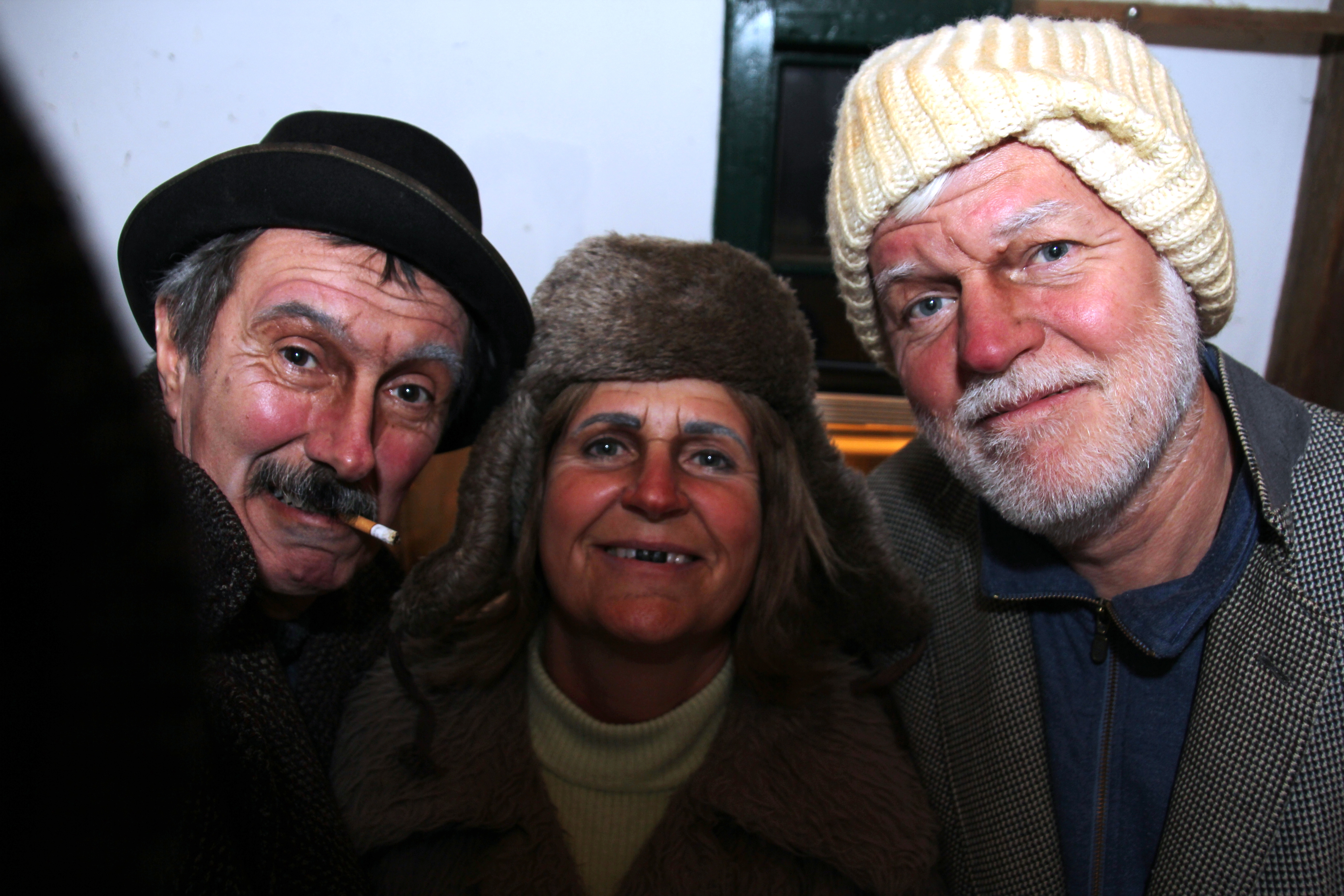 Selfie der drei Sandler aus dem Stück "Die geputzten Schuhe"